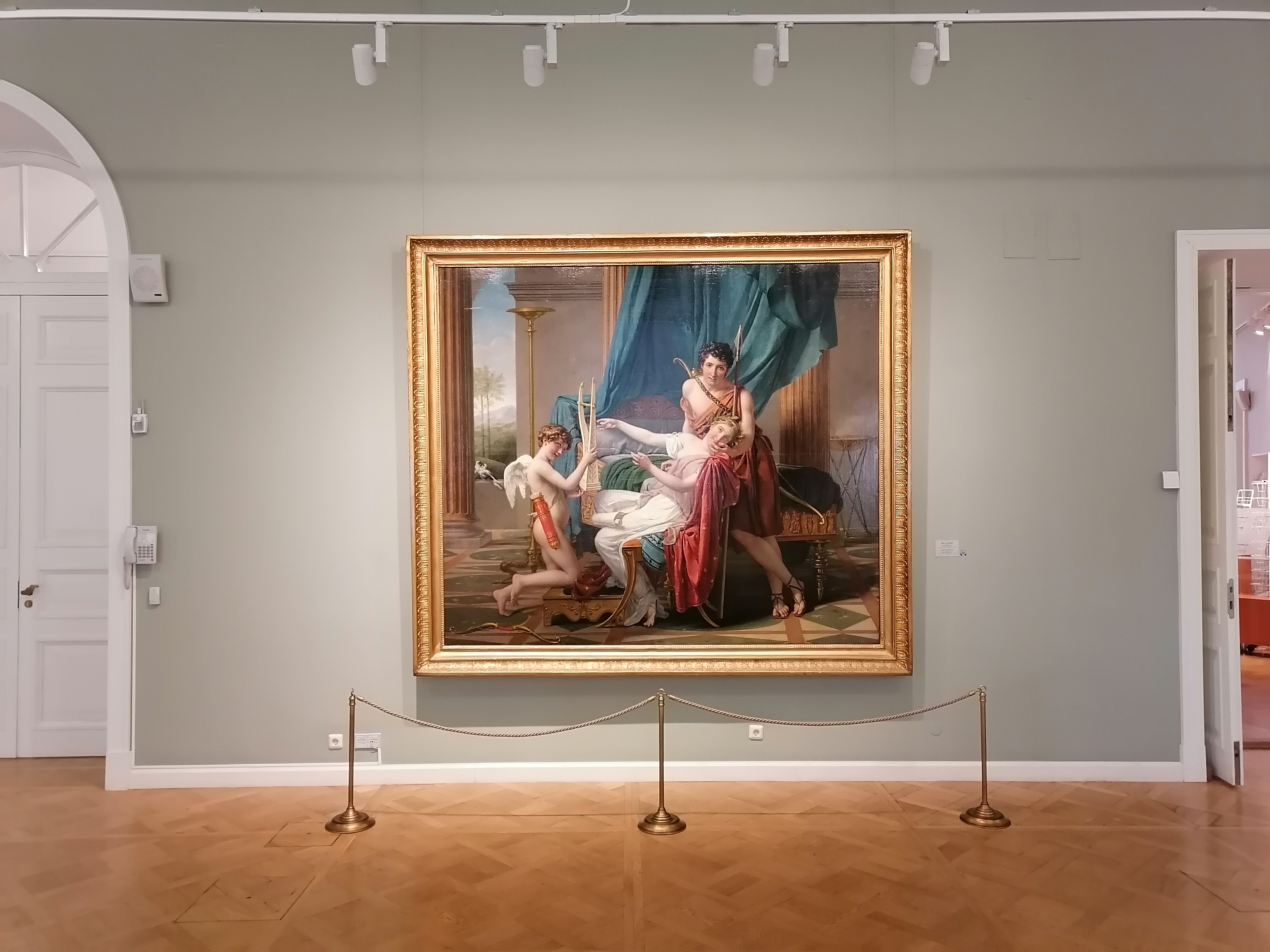 Эрмитаж, здание Главного штаба, зал 303 - Жак-Луи Давид "Сафо и Фаон"